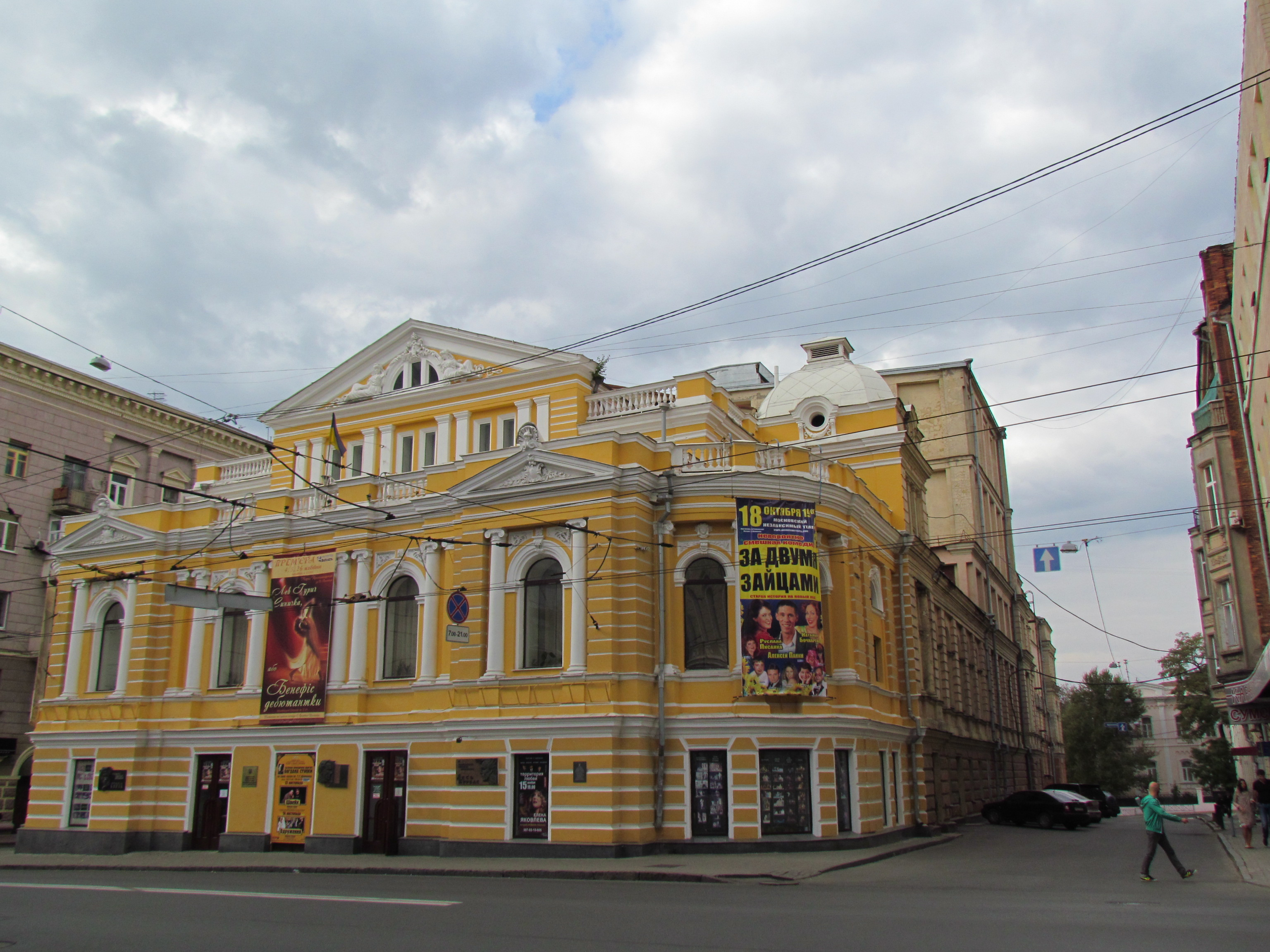 Україна, Харків, вул. Сумська, 9